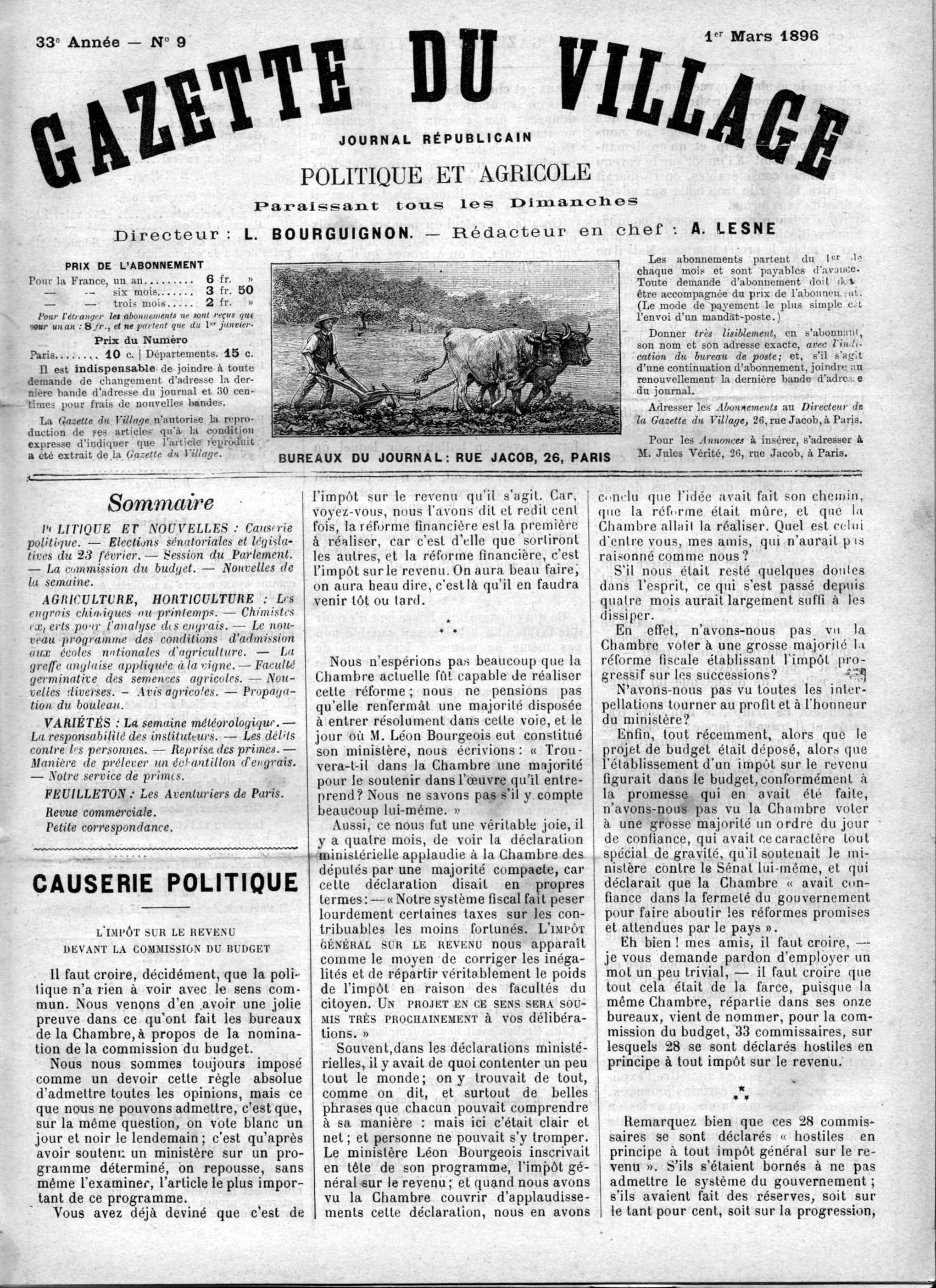 Scan de la première page de la "Gazette du village" du 1er mars 1896